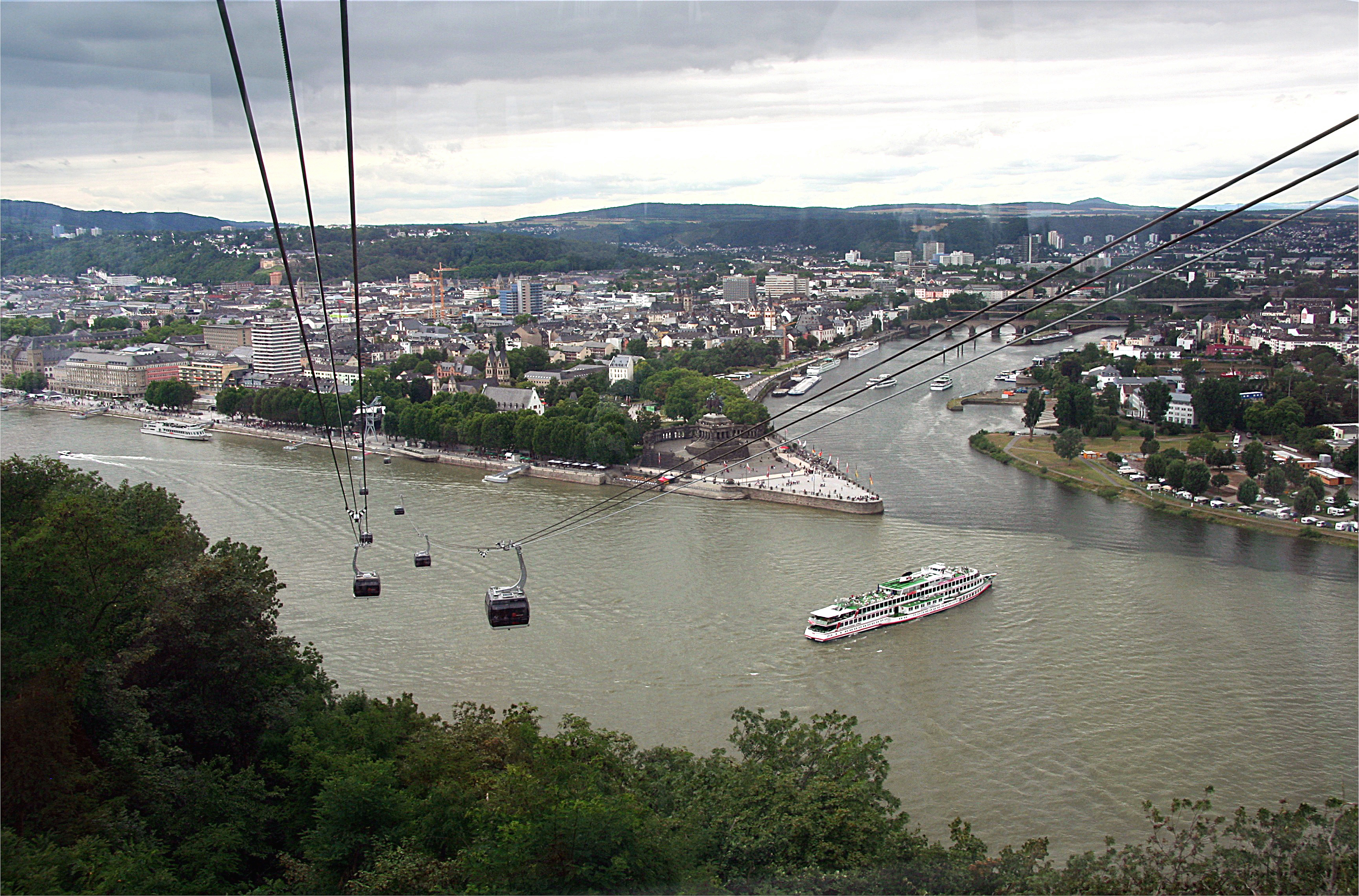 Blick von der Seilbahn auf das Deutsche Eck und MS Wappen von Köln während der BUGA 2011 in Koblenz